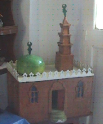 نموذج لمسجد بالمتحف